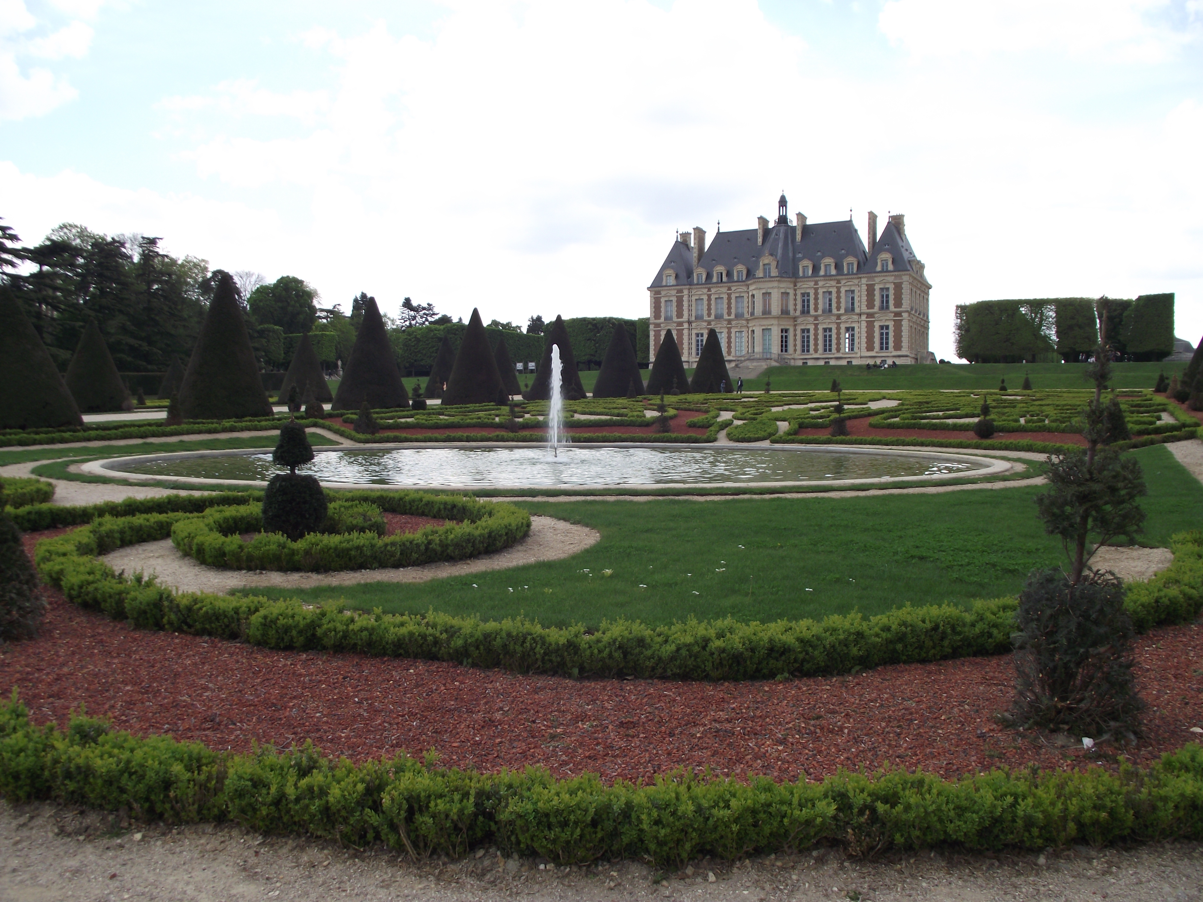 Château de Sceaux, XVII-XIX siècle